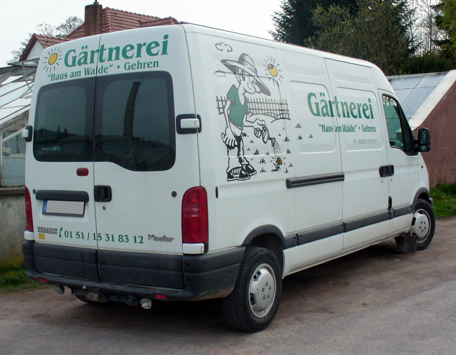 Renault Master II Phase I